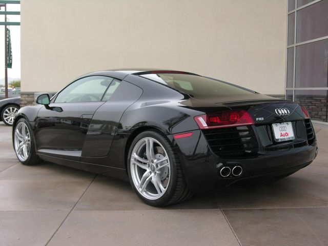 Audi R8